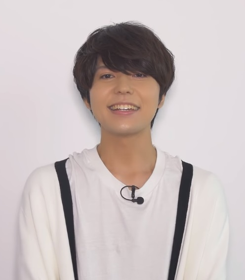 汐谷文康（声優）